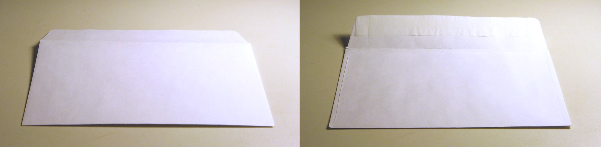 Koverto Mi, aŭtoro de la bildo, permesas al ĉiuj uzi ĝin kun ĉi tiaj kondiĉoj